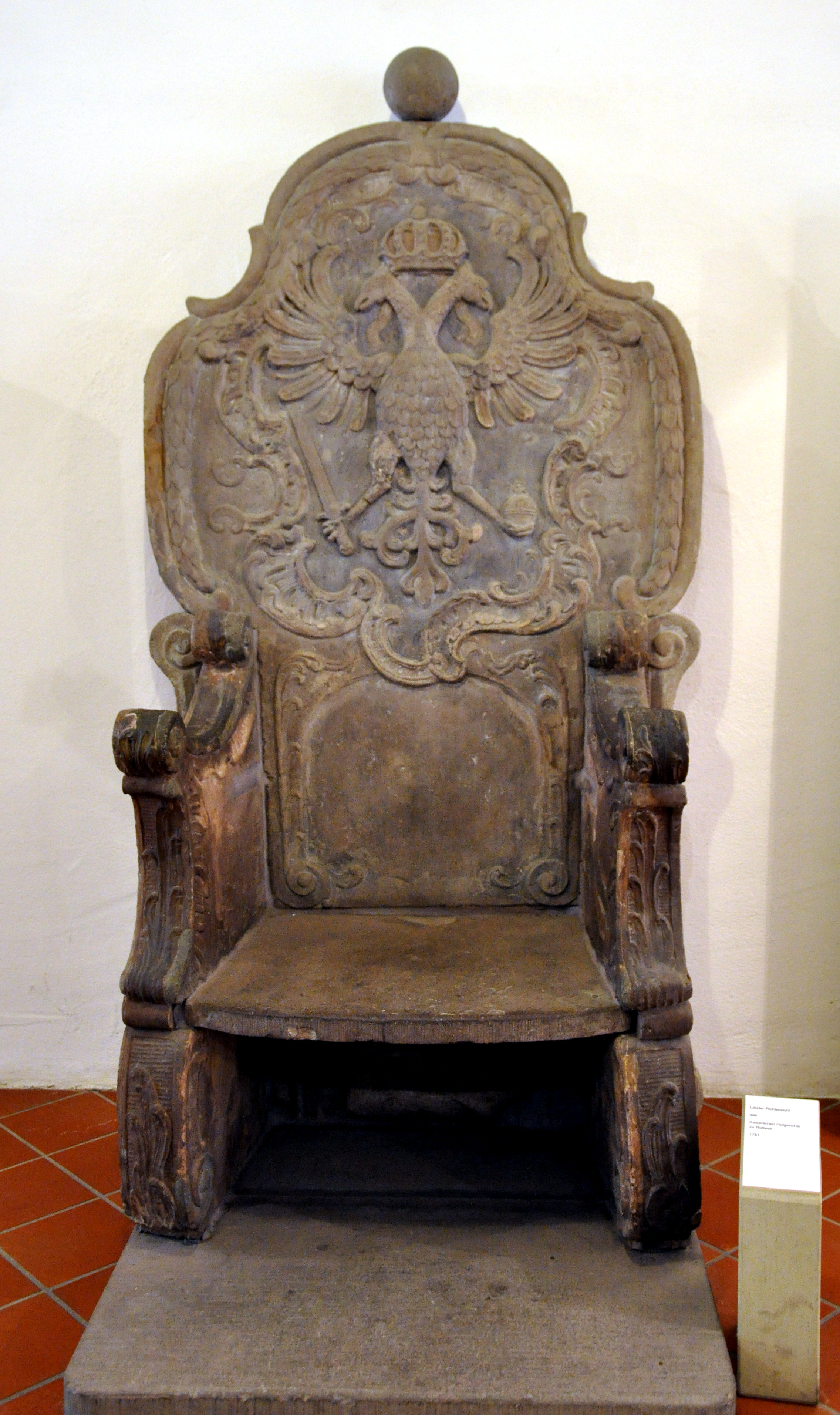 Letzter Richtstuhl des kaiserlichen Hofgerichts Rottweil, 1781, Stadtmuseum Richtstuhl